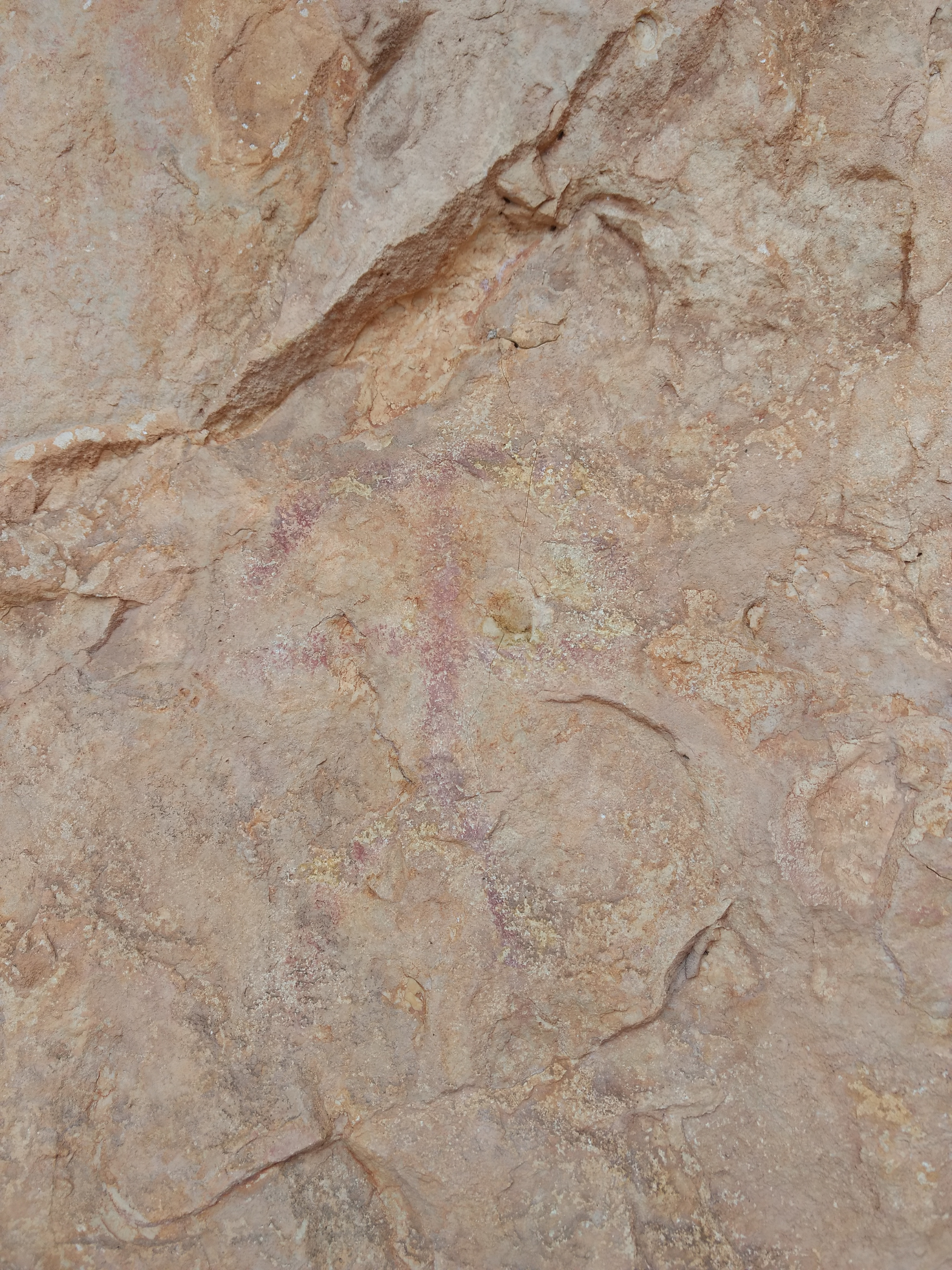 Pintura rupestre en el parque natural de María-Los Vélez, en Almería (España).